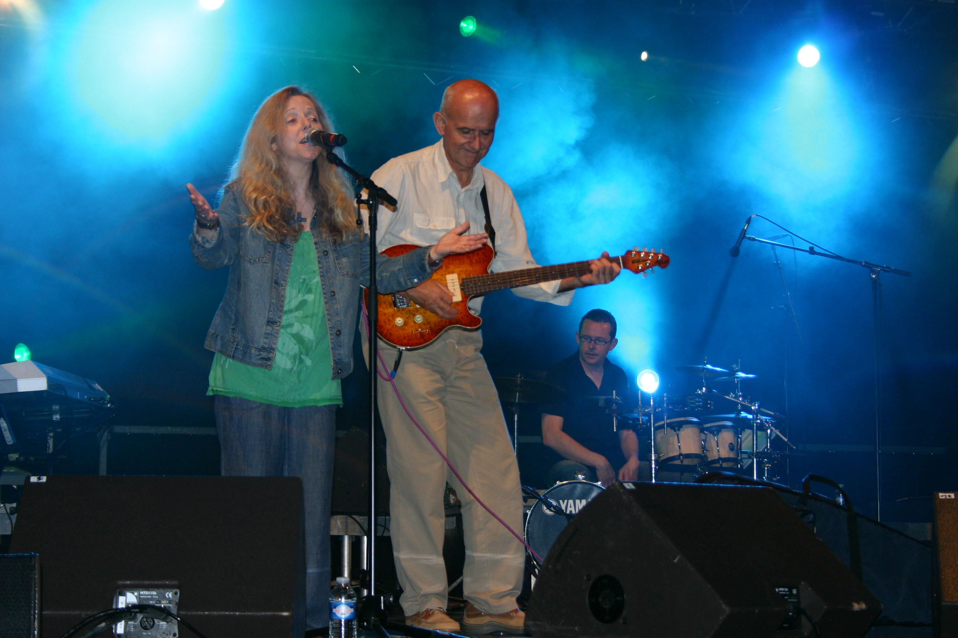 Elaine Morgan et Dan Ar Braz sur scène lors de l'Aymon Folk Festival de Bogny-sur-Meuse le 02 août 2008.